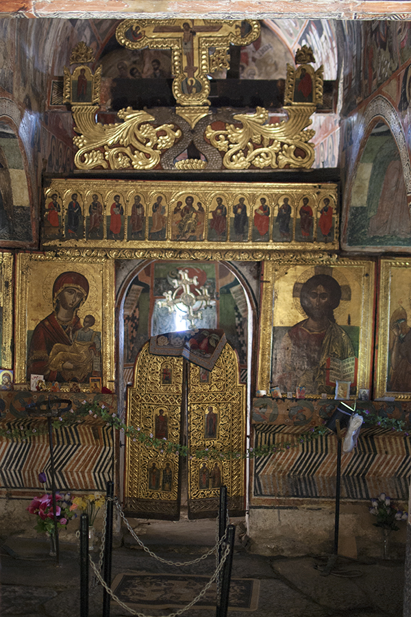 Църква „Св.св.Тодор Тирон и Тодор Стратилат" - иконостас